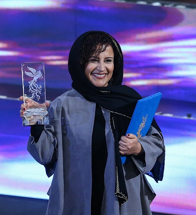 فرشته صدرعرفایی در اختتامیه سی‌وهفتمین جشنواره فیلم فجر